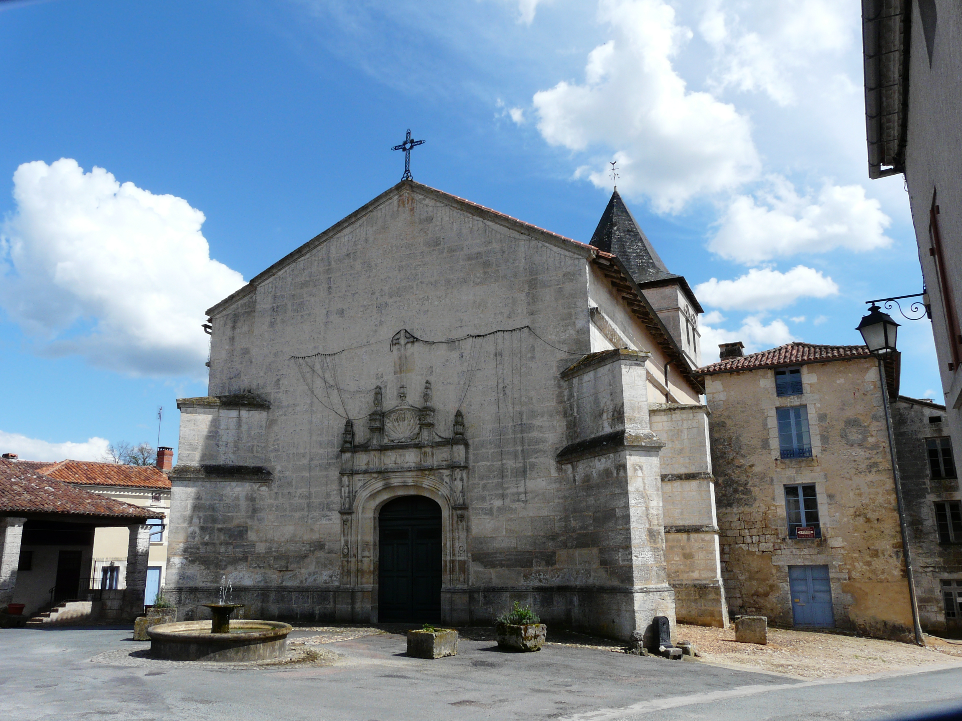 L'église Saint-Martial, Villars, Dordogne, France Object location45° 25′ 11.8″ N, 0° 45′ 13.4″ E